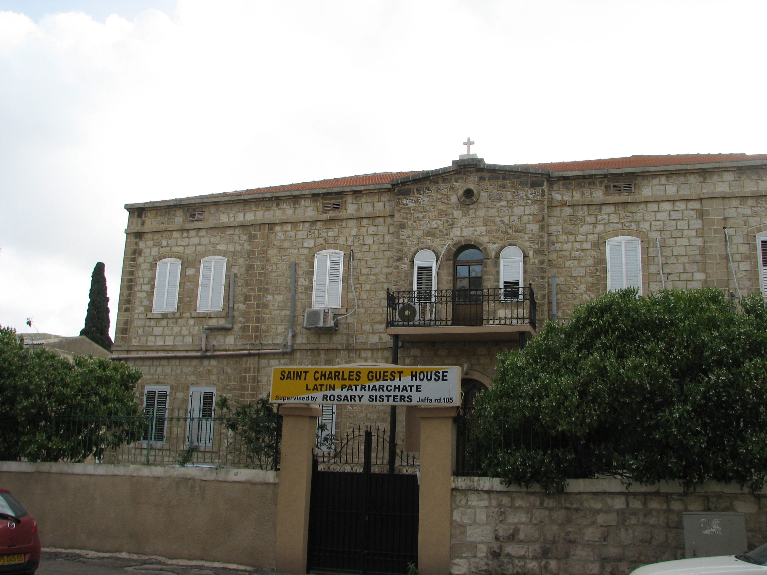 German Guest House, downtown Haifa אנשי ההוספיץ הגרמני על שם קרל בורמאוס הגיעו לחיפה בשנות ה-80 של המאה ה-19. ב-1881 הם רכשו אדמה ליד המושבה הגרמנית והקימו במקום בית הארחה נמצא בדרך יפו 105 חיפה